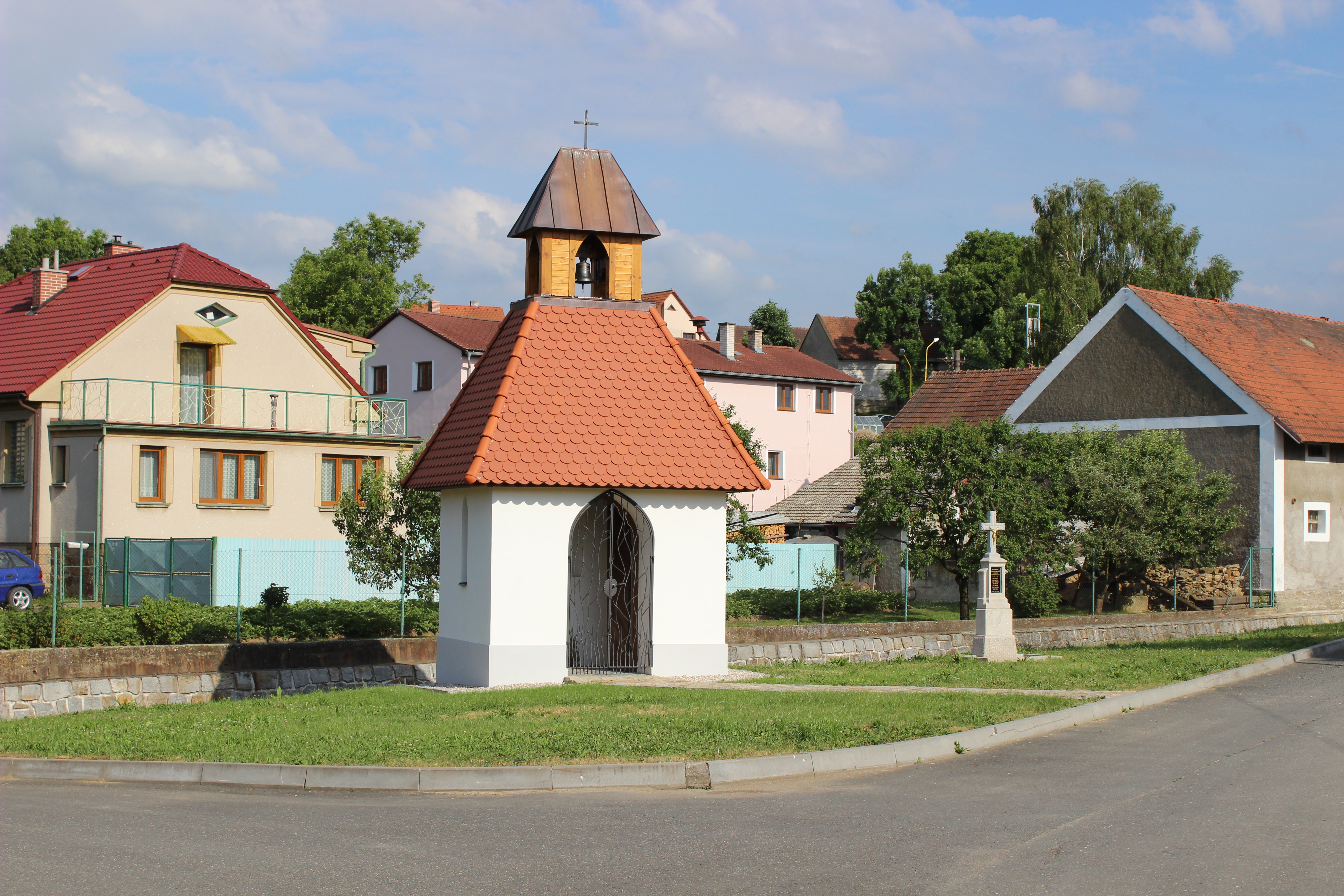 Kaplička s křížkem v Bernarticích v benešovském okrese.